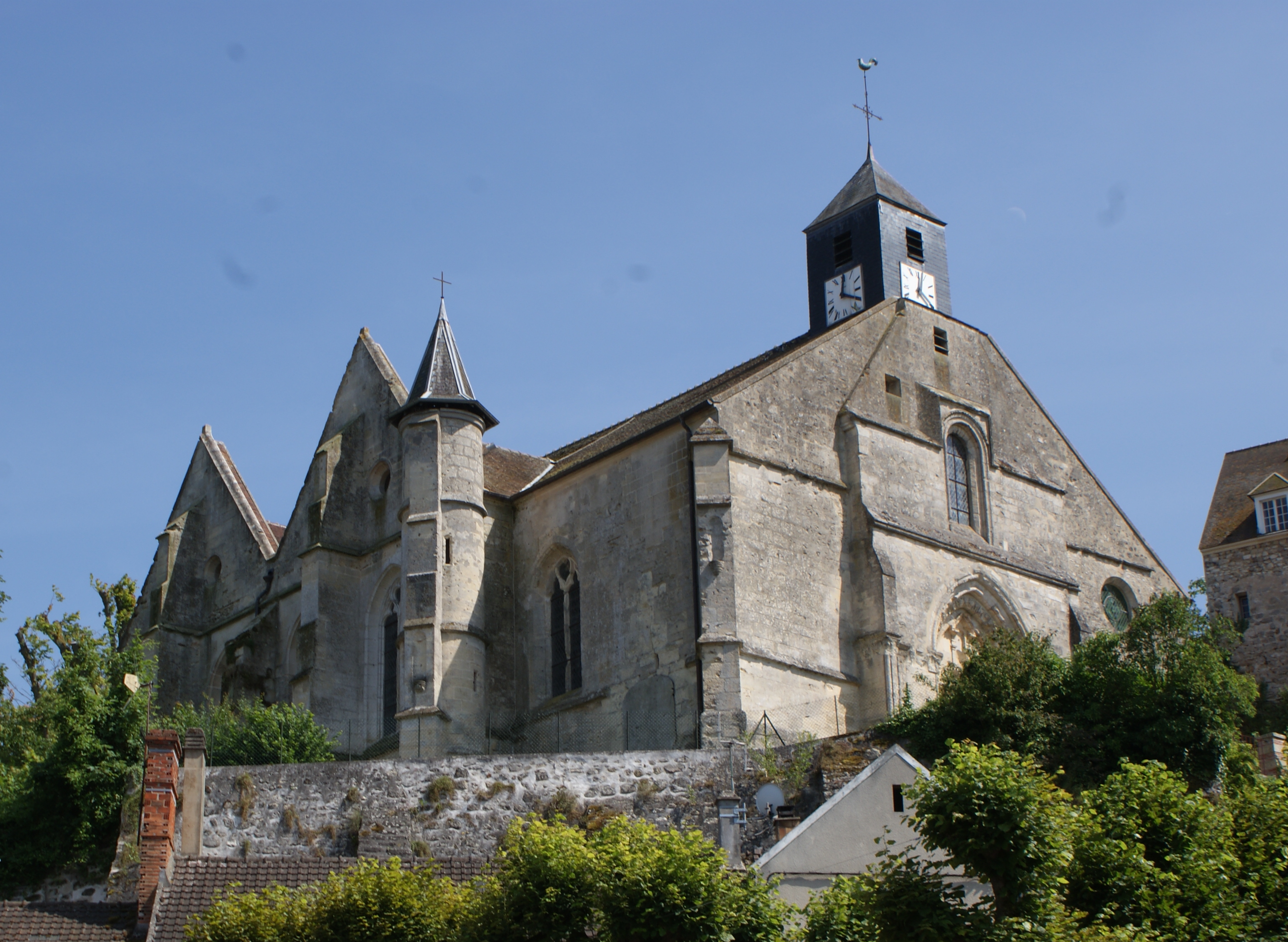 Eglise Saint Remy, datant du Moyen-Age (entre le IXe et le XIIe siècles), remaniée au XVIe et XVIIe siècles. Elle fit partie du château de Gandelu. Classée aux Monuments historiques en 1920